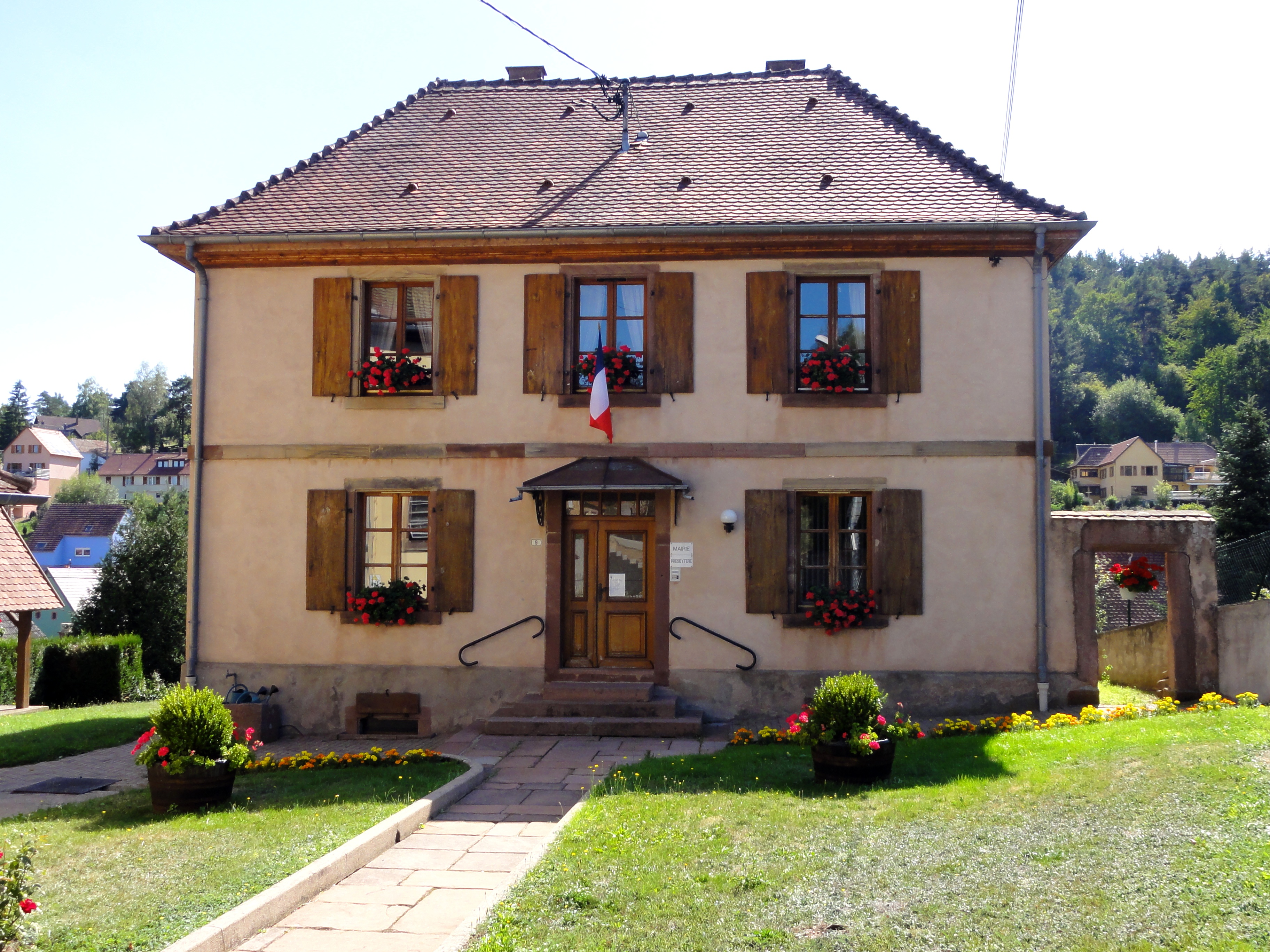 Alsace, Bas-Rhin, Neubois, Ancien presbytère (1862), aujourd'hui mairie, 9 rue de l'Eglise: .